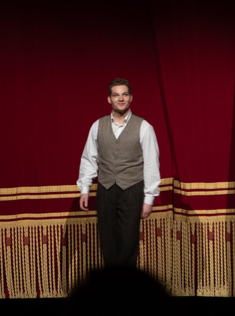 Denis Milo Bariton as Figaro after his performance in Il Barbiere di Siviglia